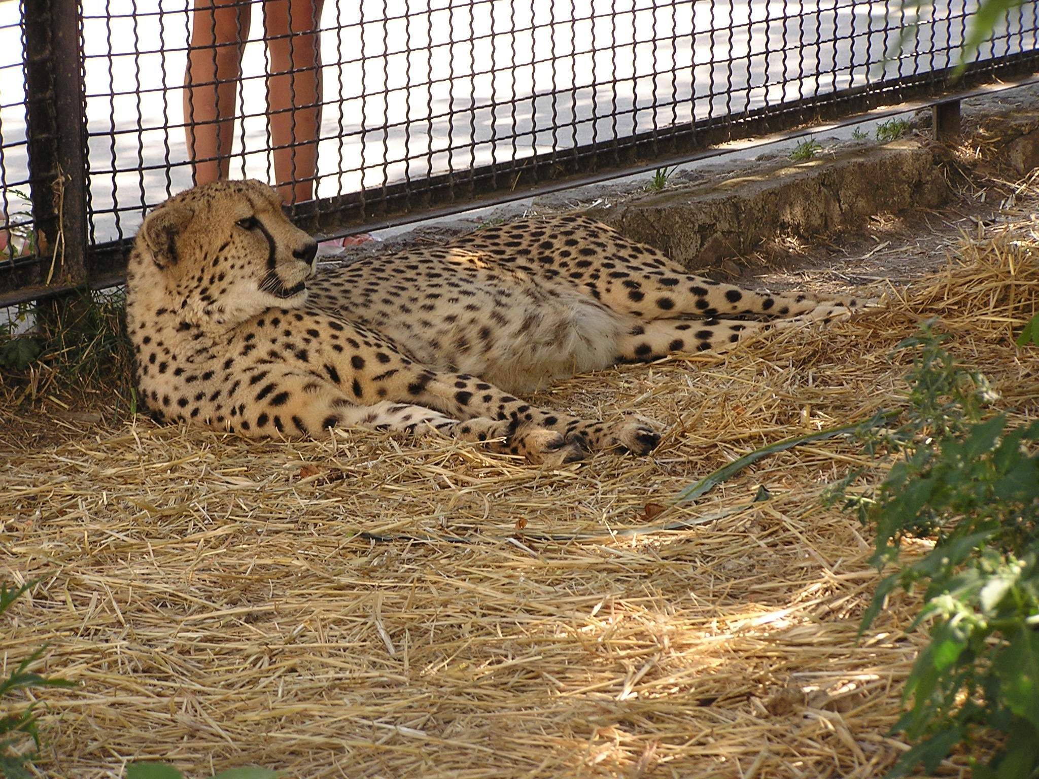 Ялтинский зоопарк. Гепард (Acinonyx jubatus)